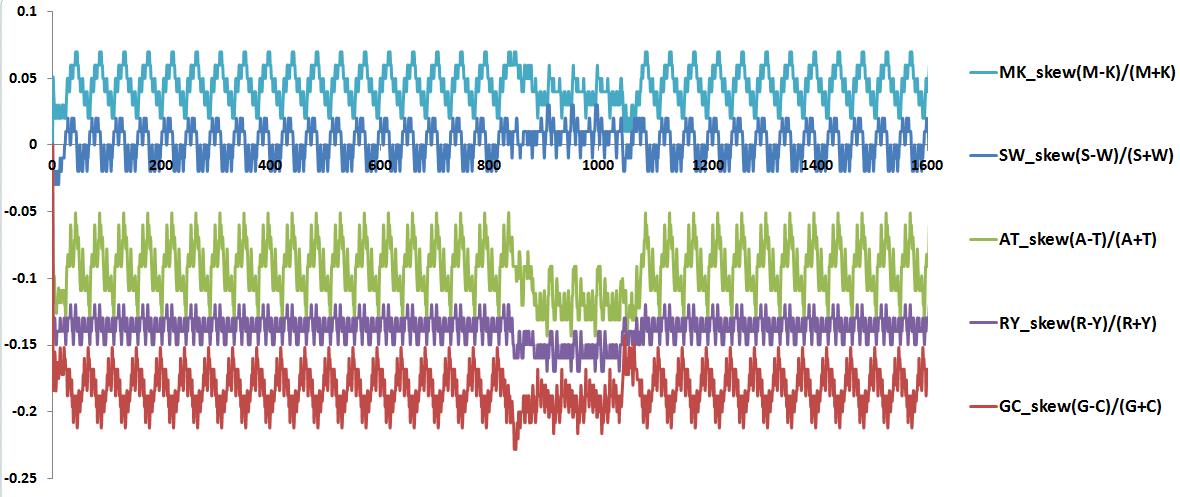 Сравнения смещений в нуклеотидном составе для рамки в 100 нуклеотидов, для короткого фрагмента ДНК в 2 тыс нуклеотидов. На оси Х координаты в нуклеотидах, на оси Y величины смещений.